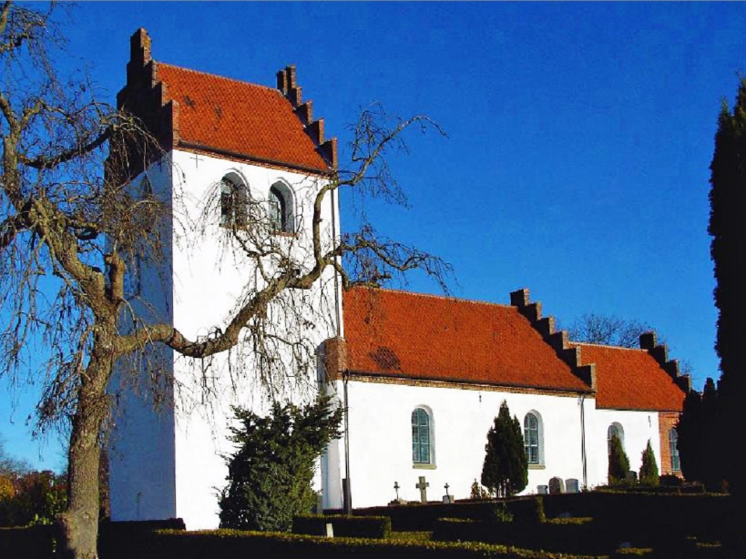 Jørlunde kirke, Frederikssund, fra sydvest